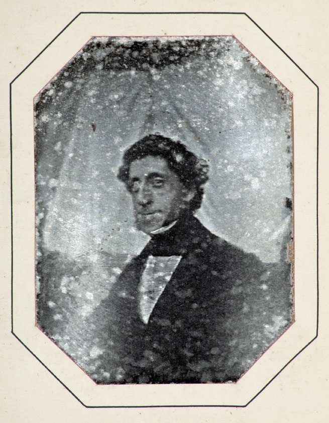 Henri Vriesendorp, 26 juli 1842, daguerreotypie: Auvry (Stadsarchief Dordrecht, bruikleen familie Vriesendorp)